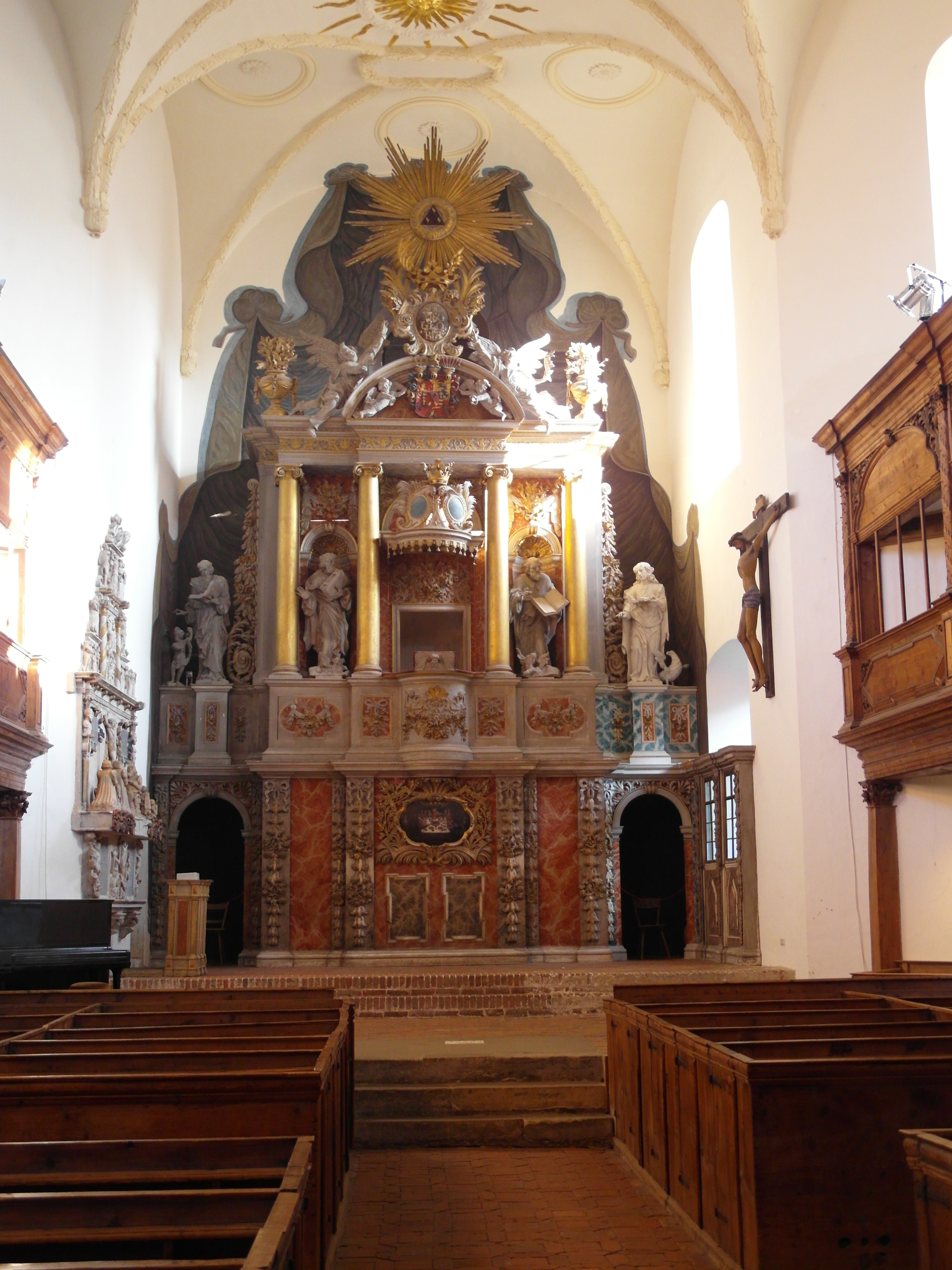 Alter der Kirche St. Blasii in Quedlinburg